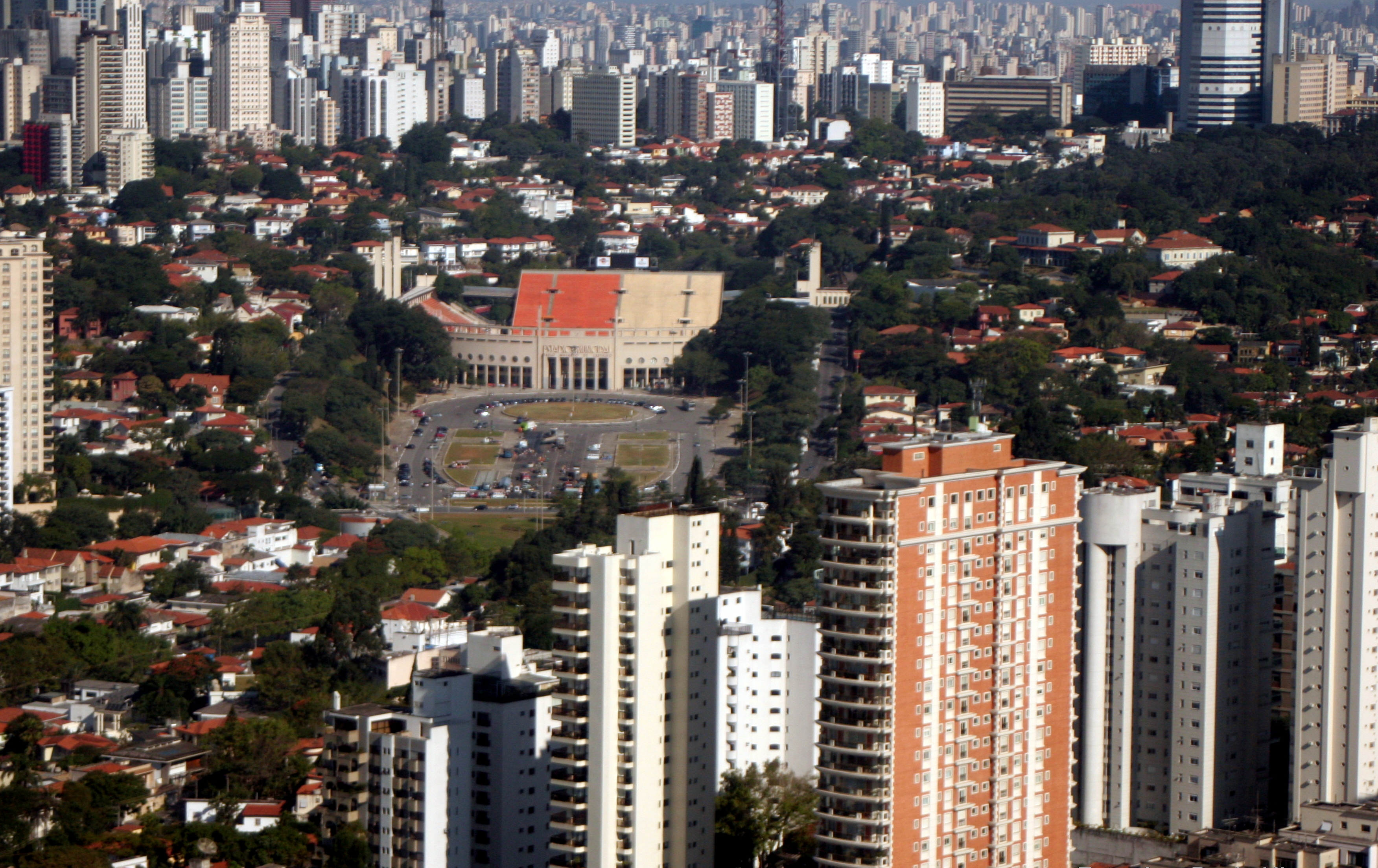 Vista aérea do bairro e do estádio do Pacaembu em São Paulo, Brasil.